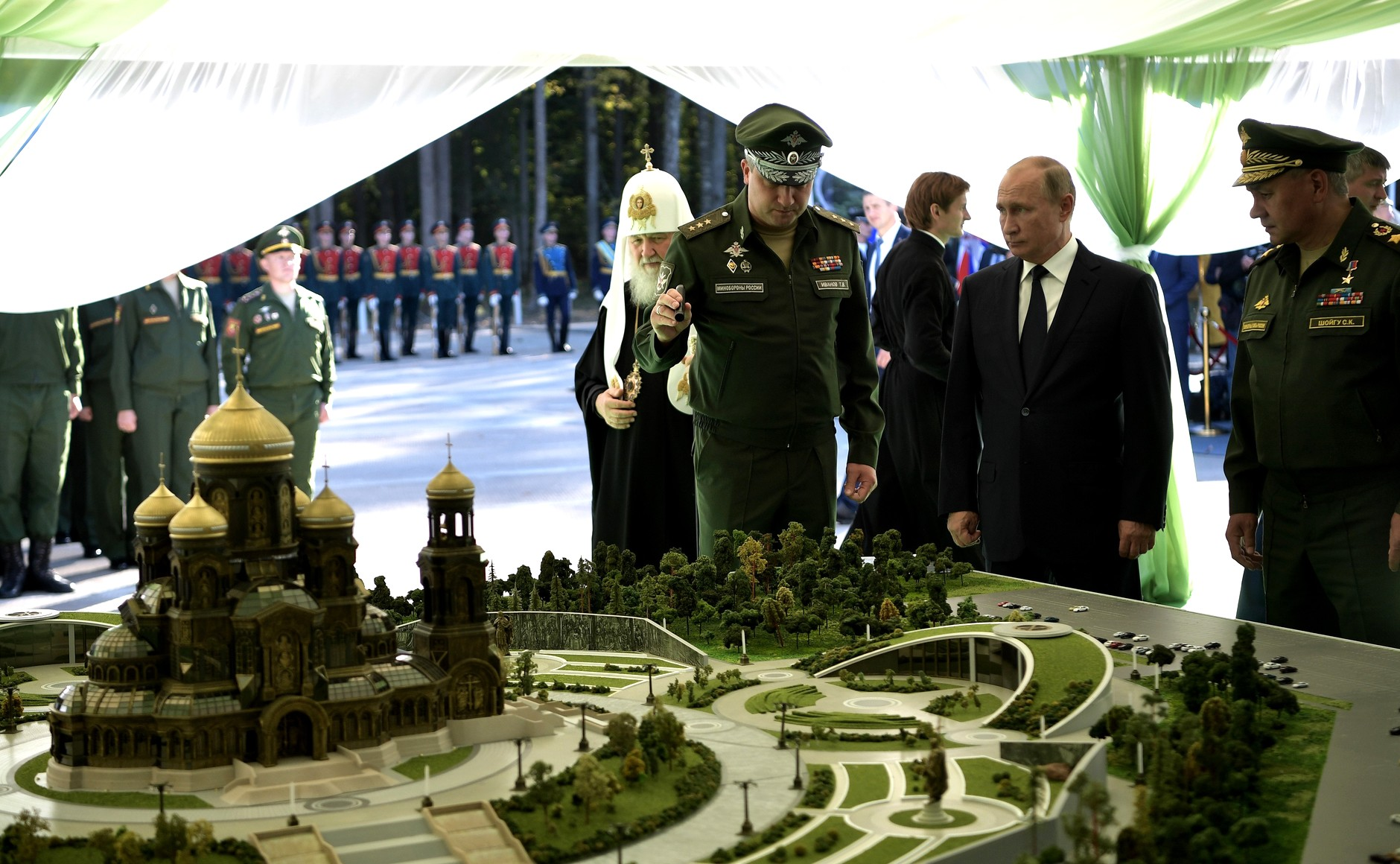 Посещение Президентом России Владимиром Путиным Военно-патриотического парка культуры и отдыха Вооружённых Сил Российской Федерации «Патриот». Во время осмотра макета Главного храма Вооружённых Сил в Военно-патриотическом парке культуры и отдыха Вооружённых Сил Российской Федерации «Патриот»